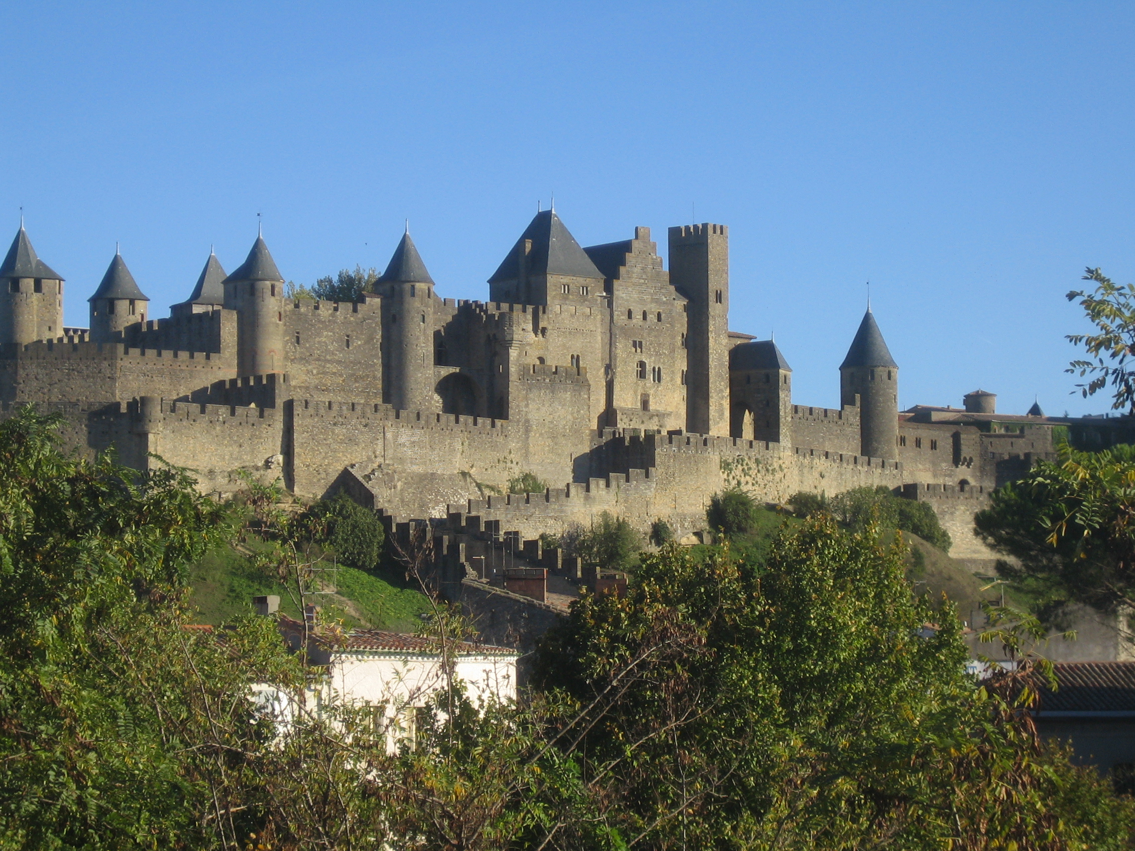 Die Burg von Carcassonne aus größerer Entfernung